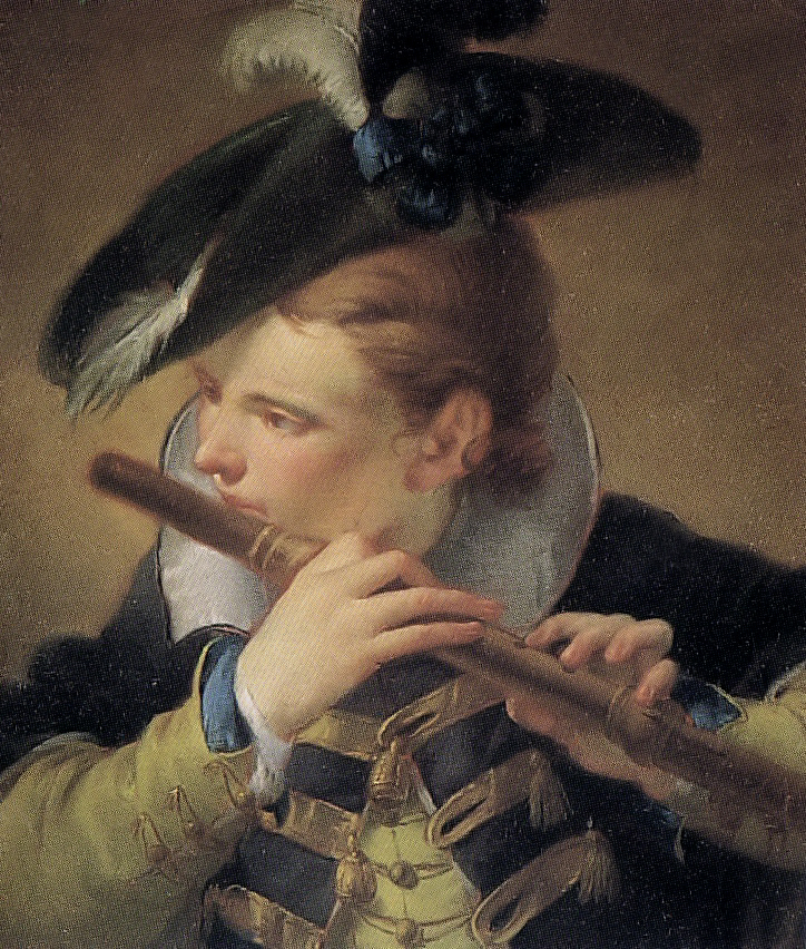 Il Pifferaio